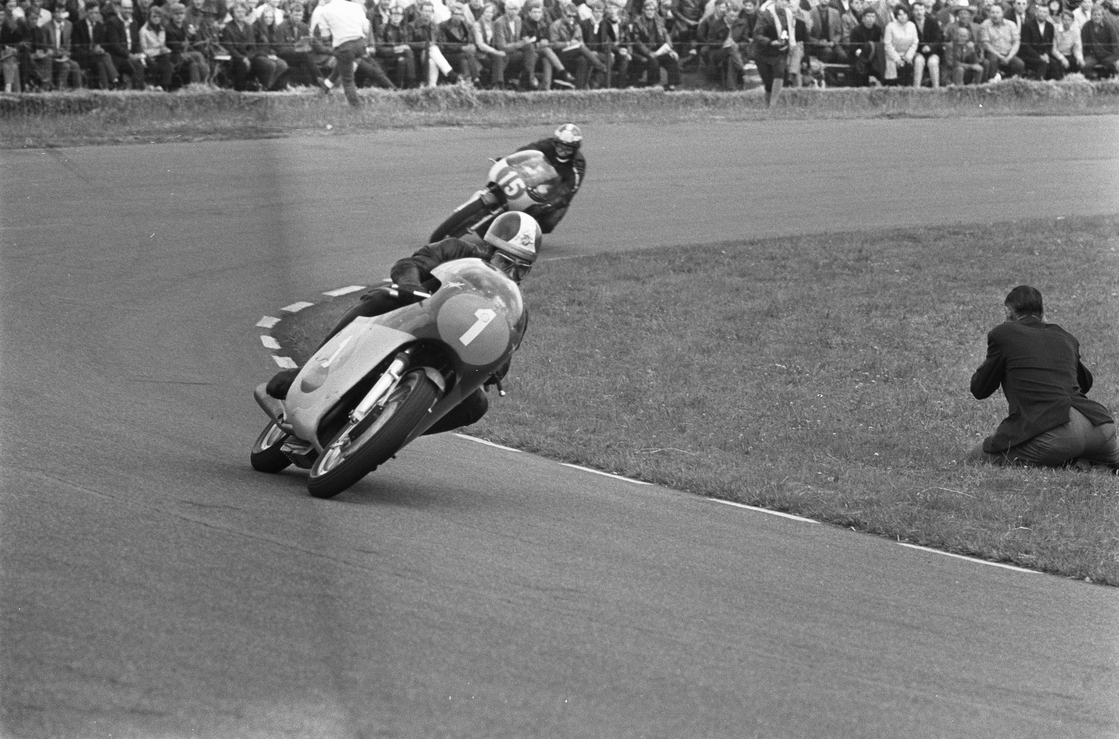 Collectie / Archief : Fotocollectie Anefo Reportage / Serie : TT Assen 1969 Beschrijving : Agostini in actie Annotatie : randnummers negatiefstrook: 13: Agostini and Gould Datum : 28 juni 1969 Locatie : Assen, Drenthe Trefwoorden : motorcoureurs, motorraces, motorsport, racecircuits Persoonsnaam : Agostini, Giacomo Instellingsnaam : TT Fotograaf : Fotograaf Onbekend / Anefo Auteursrechthebbende : Nationaal Archief Materiaalsoort : Negatief (zwart/wit) Nummer archiefinventaris : bekijk toegang 2.24.01.05 Bestanddeelnummer : 922-5831